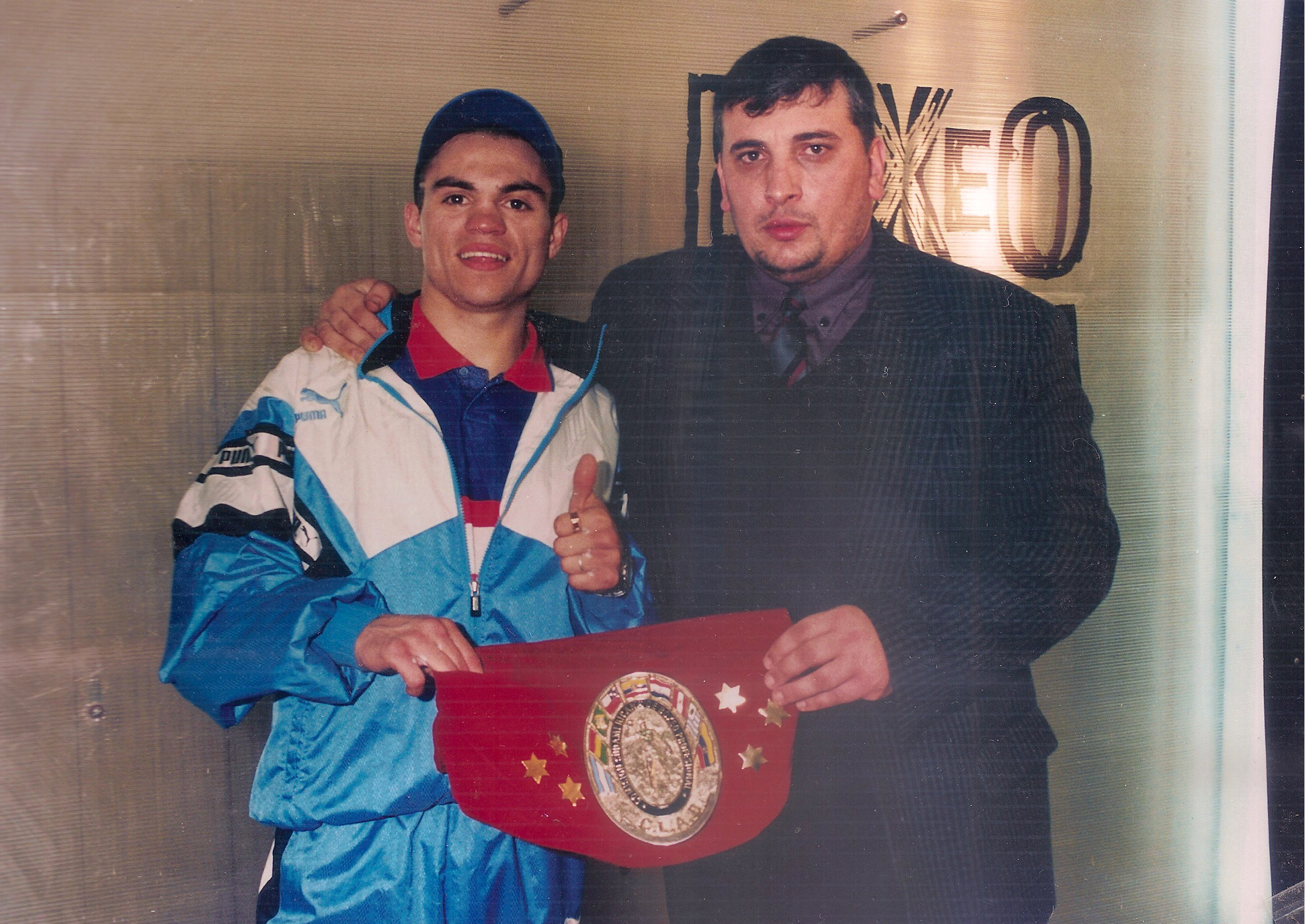 Hiena Barrios y su manager José Valle